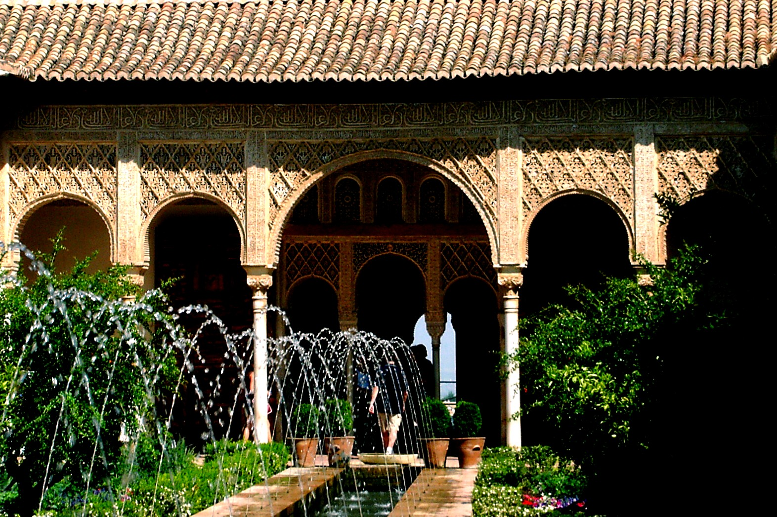 Granada, Alhambra: Mirtuszos udvar